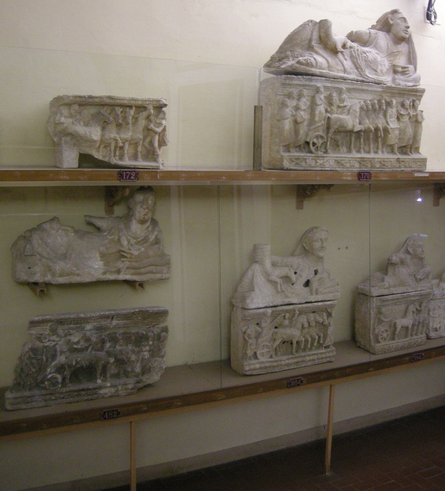 Museo guarnacci, sala delle urnette etrusche 2